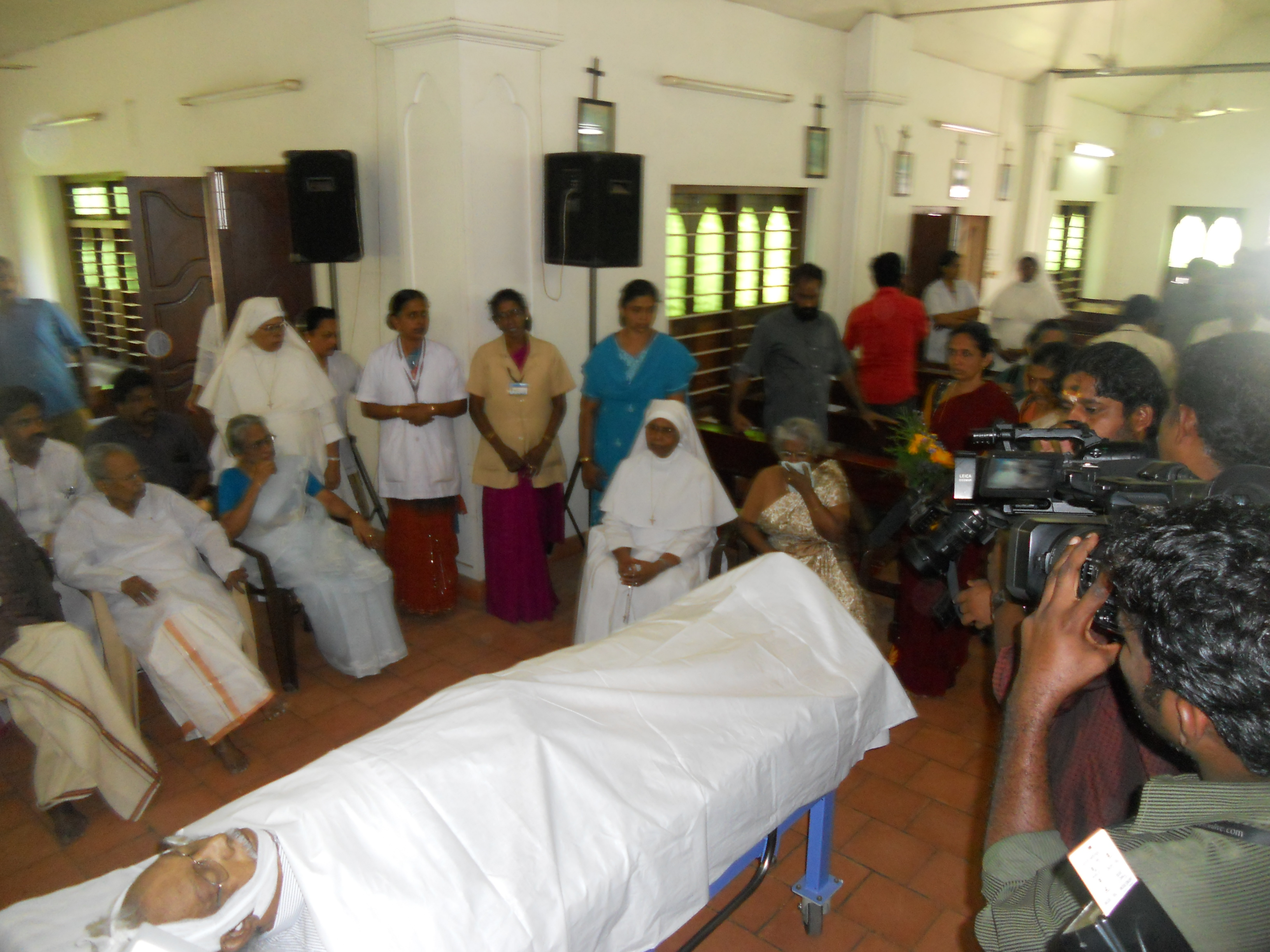 Noted malayalam writer Kakkanadans body at Benziger Hospital chappel, Kollam